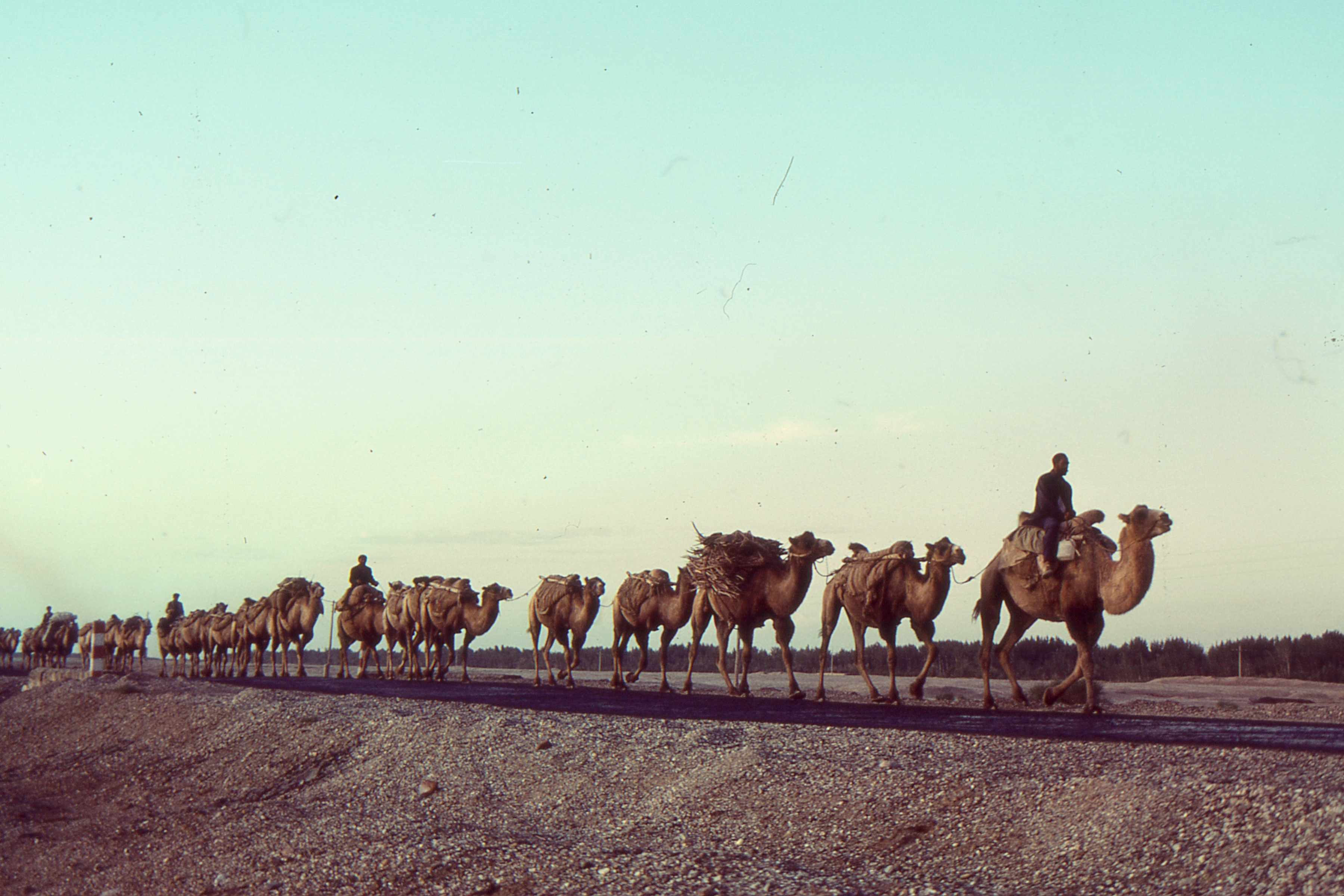 Silk Road 1992